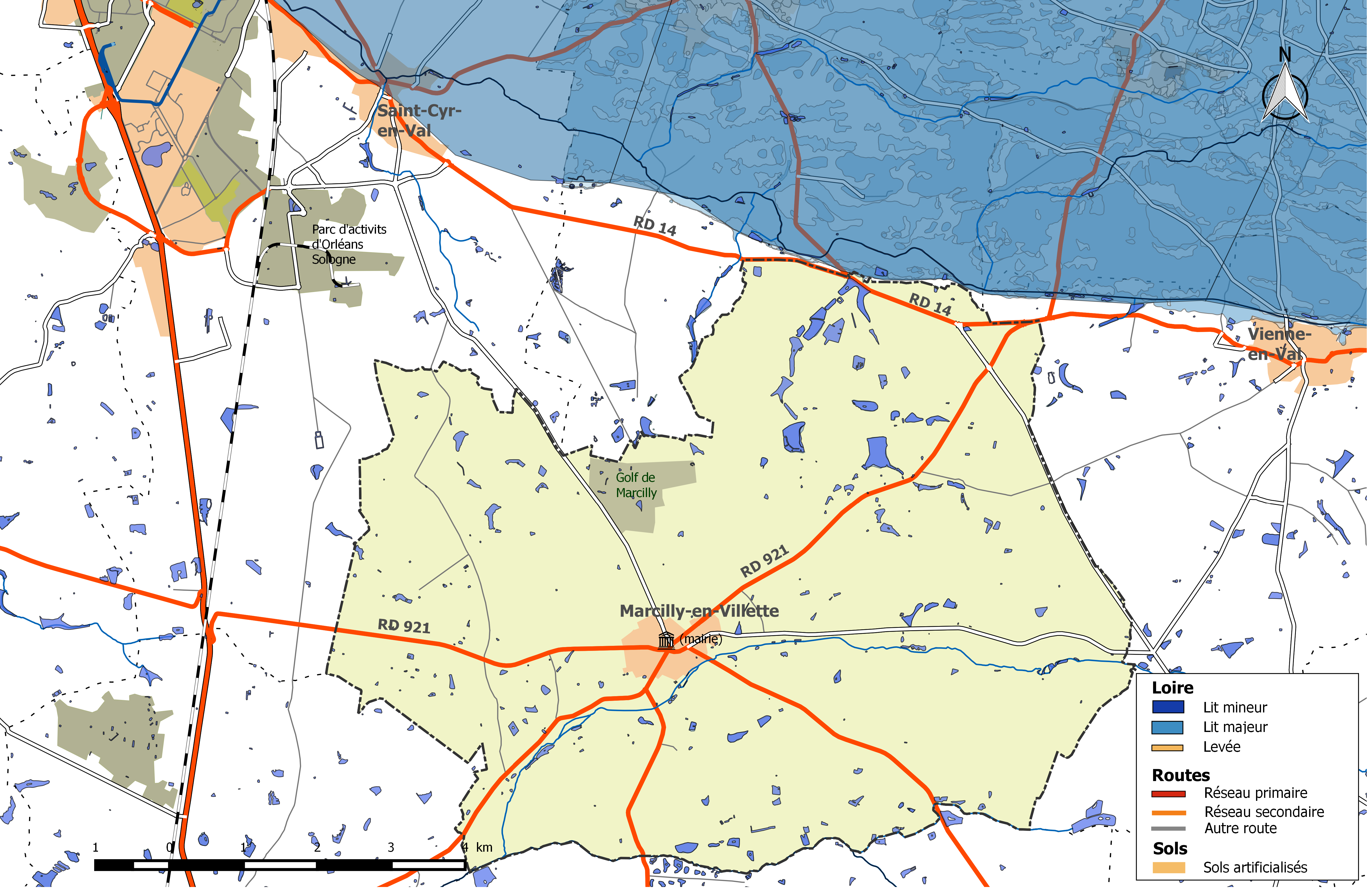 Zone inondable et réseaux hydrographique et routier de la commune de Marcilly-en-Villette.